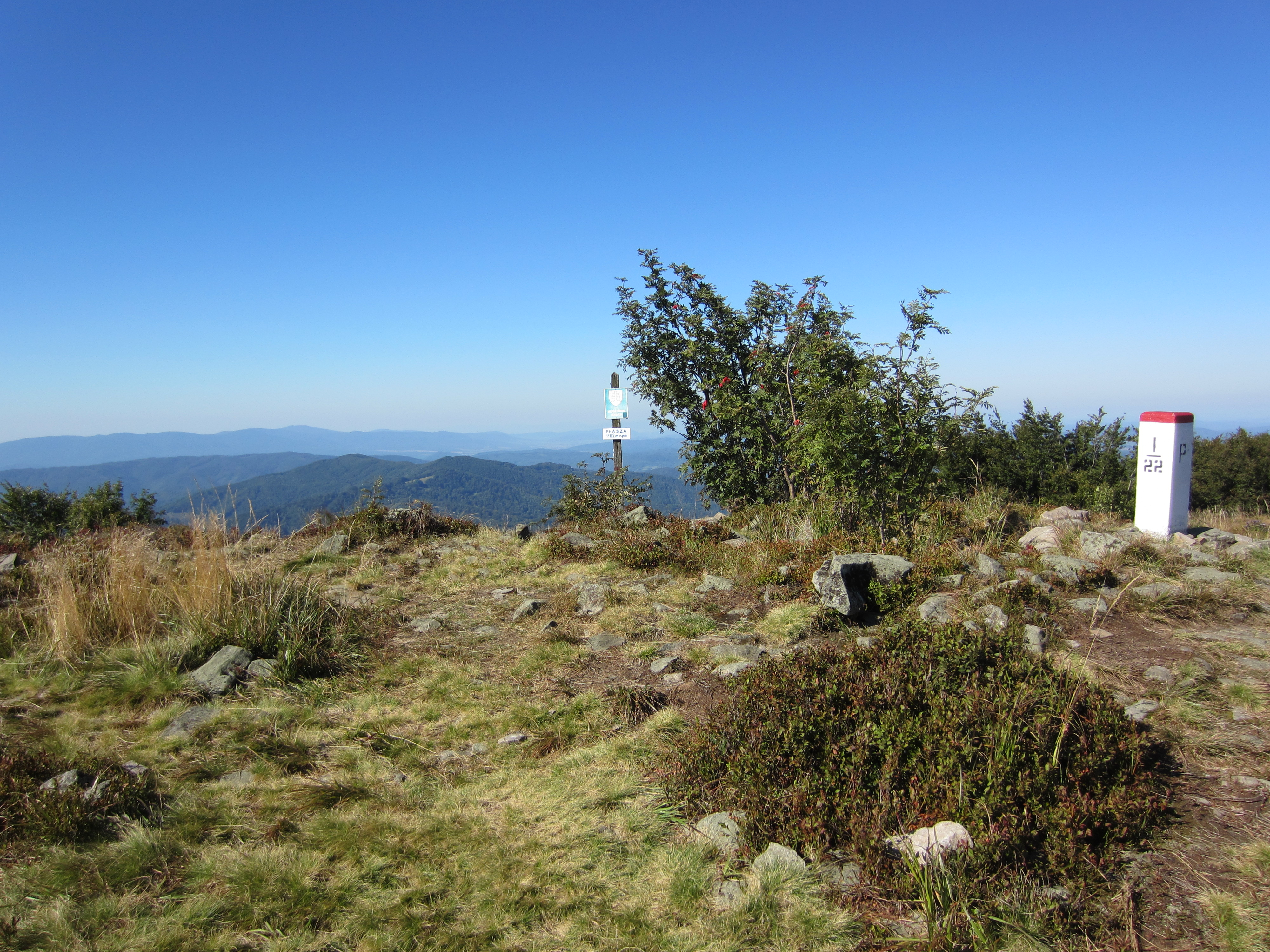 Vrchol Pľaše